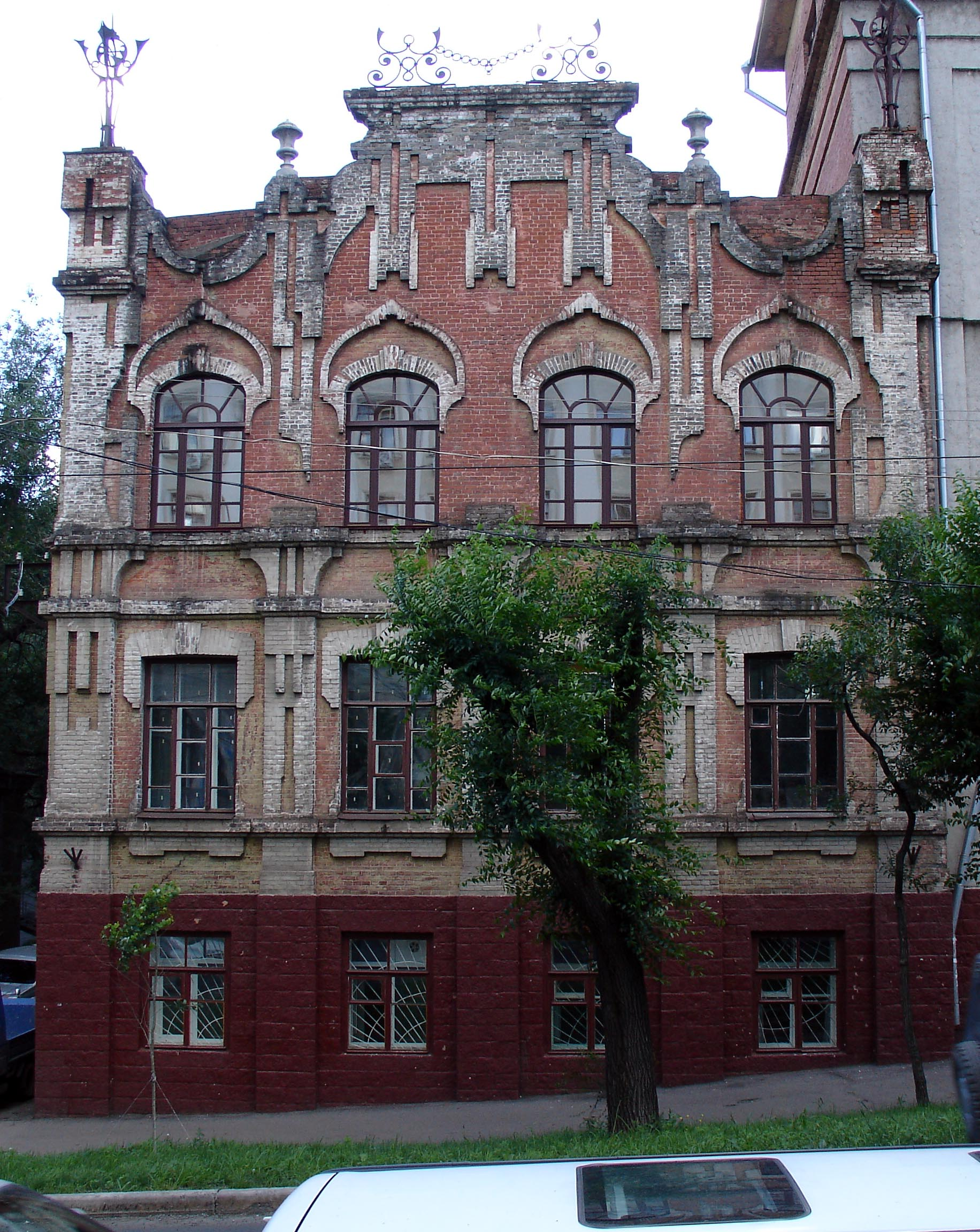 Khabarovsk, Russia, Muravyov-Amursky Street, 30